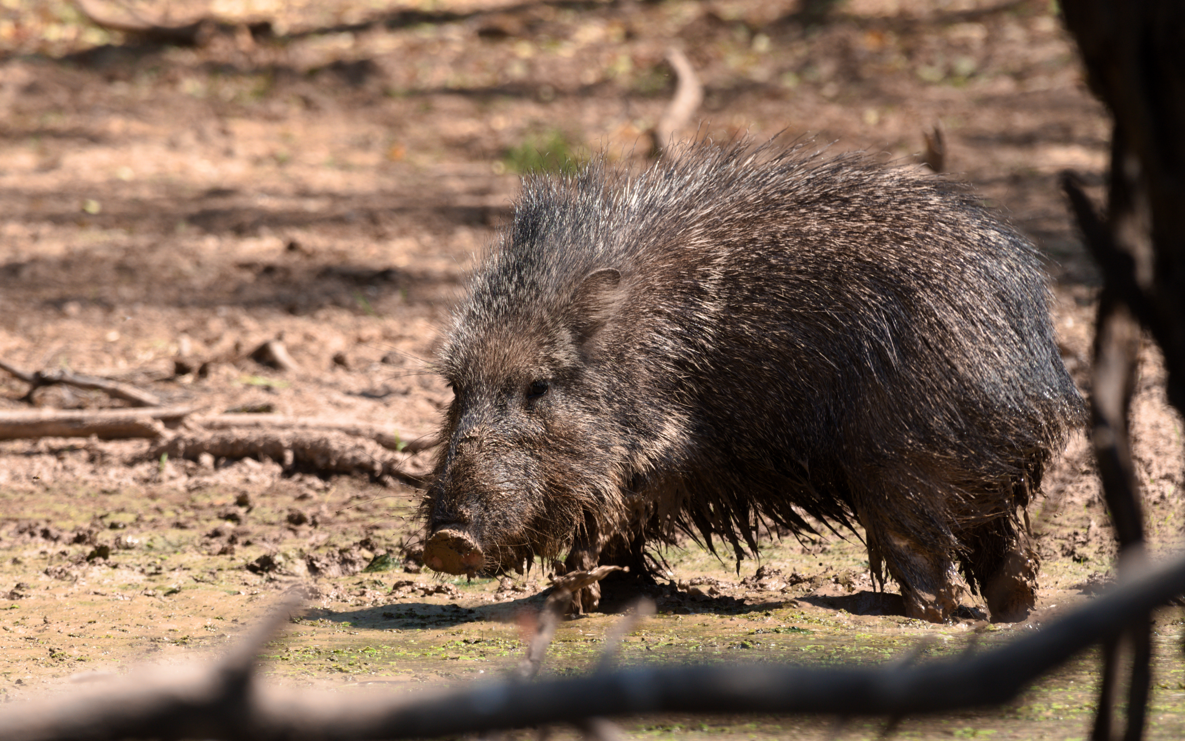 Catagonus wagneri en el Parque Nacional Teniente Enciso, Boquerón, Paraguay.